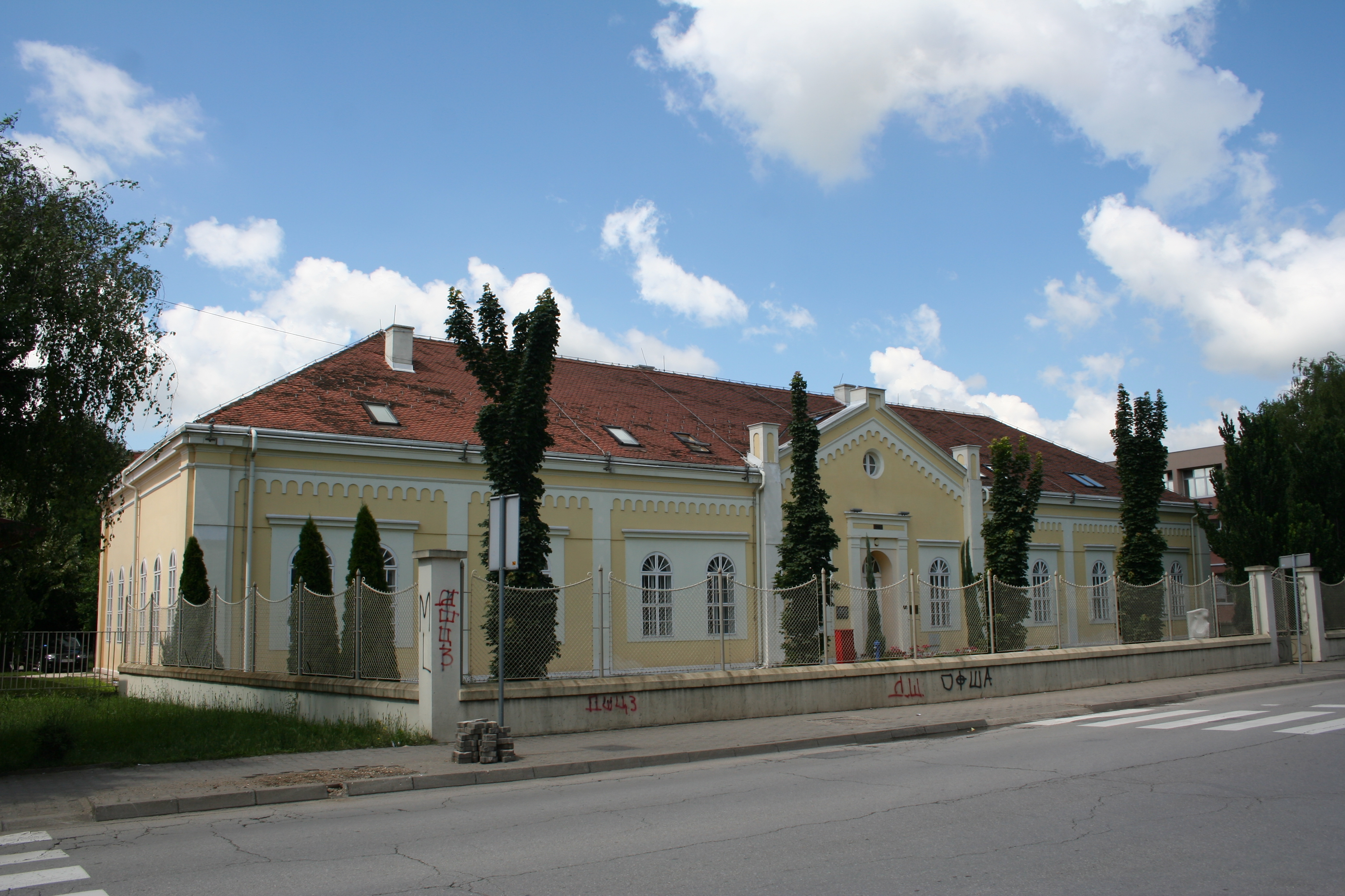 Zgrada stare bolnice (Zgrada Istorijskog arhiva)